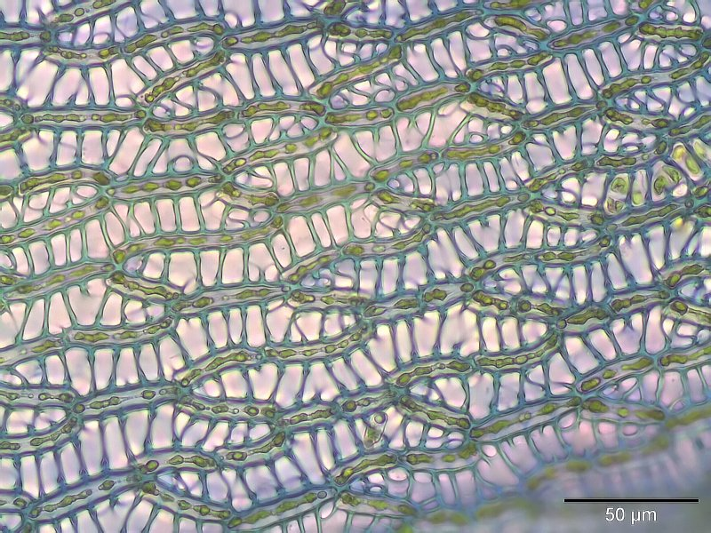 Trügerisches Torfmoos (Sphagnum fallax), Astblatt-Zellen, Vergrößerung: 400x